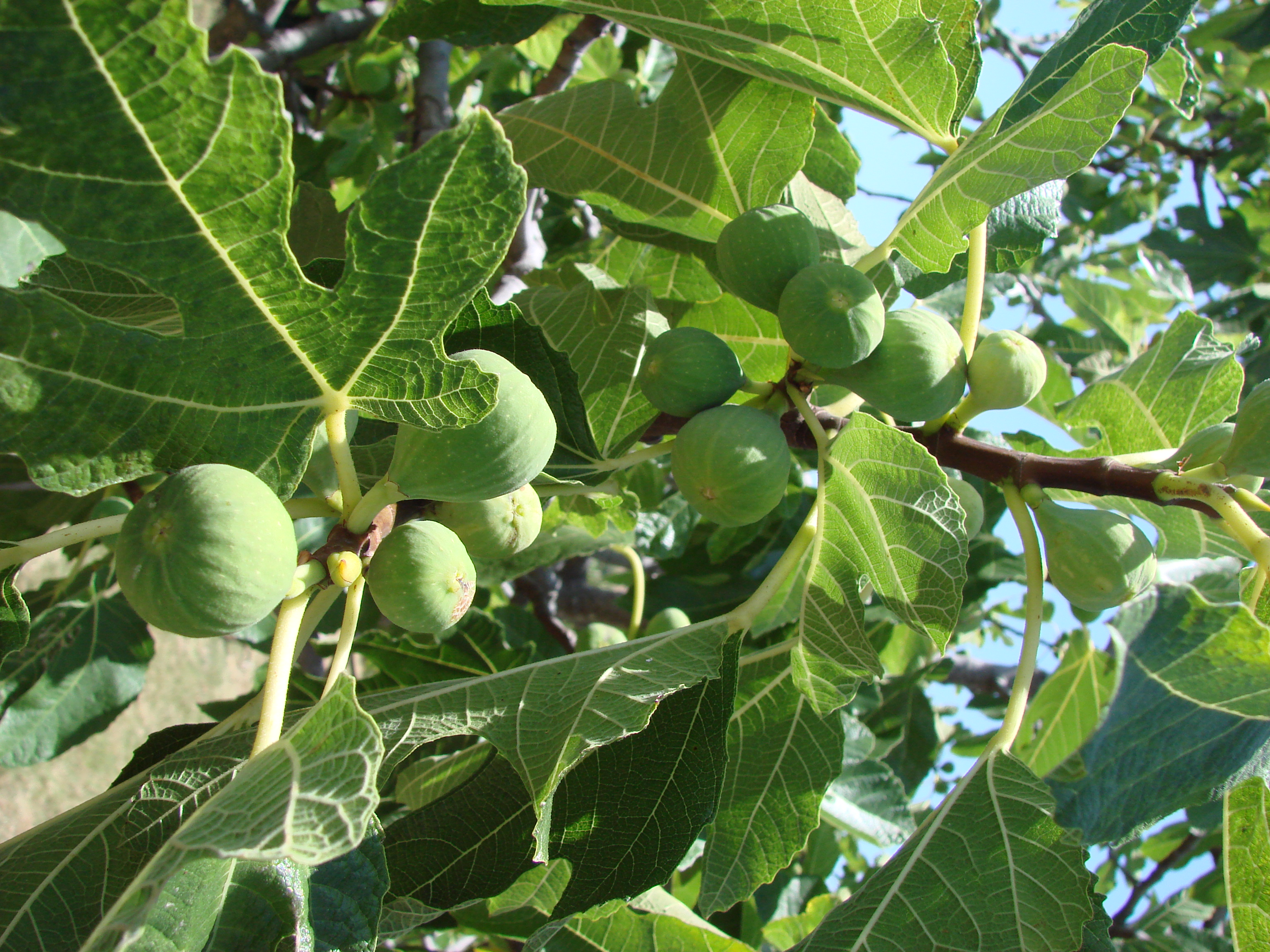 figa pospolita